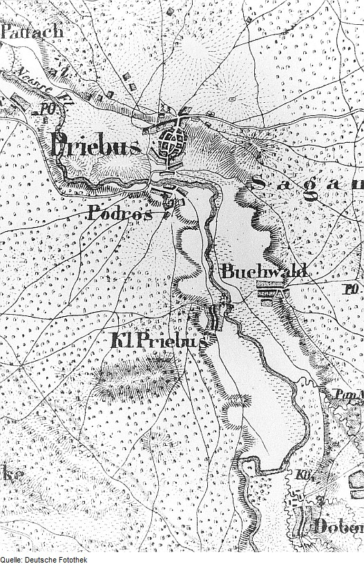 Original image description from the Deutsche Fotothek Krauschwitz-Klein Priebus. Topographische Karte vom Preußischen Staate, Bl. 252 Freienwalde, um 1823